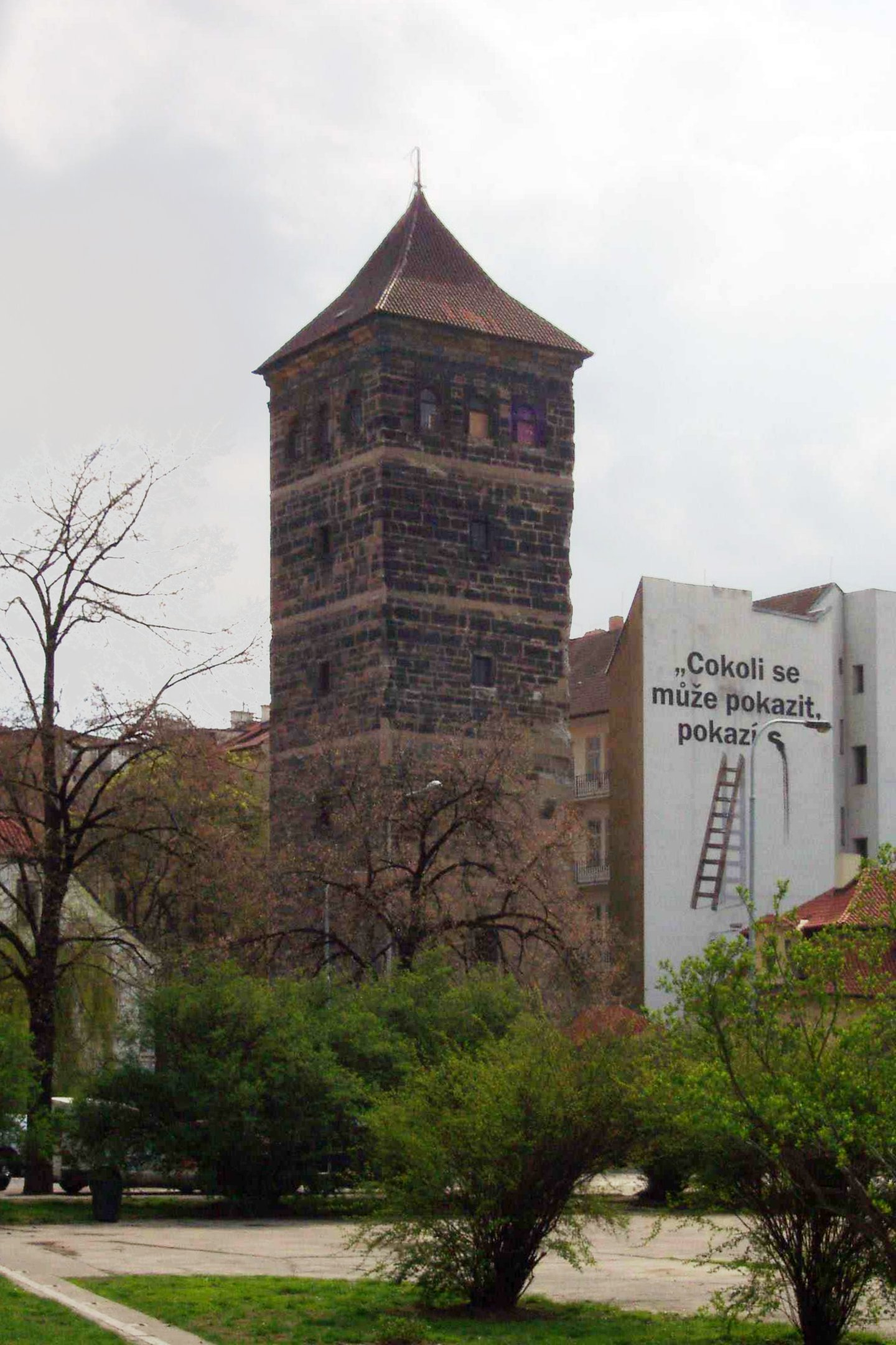 Tower next to the Štefánikův bridge in Prague - Věž u Štefánikova mostu v Praze